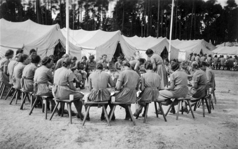 Zeltlager des weiblichen Arbeitsdienstes in Nürnberg Reichsparteitag 1939 - der nicht mehr stattfand